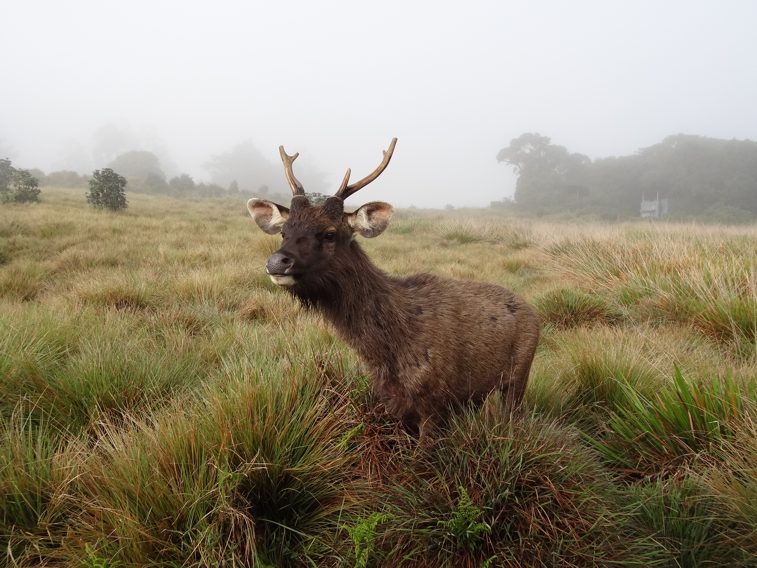 Sambar in Horton Plains National Park